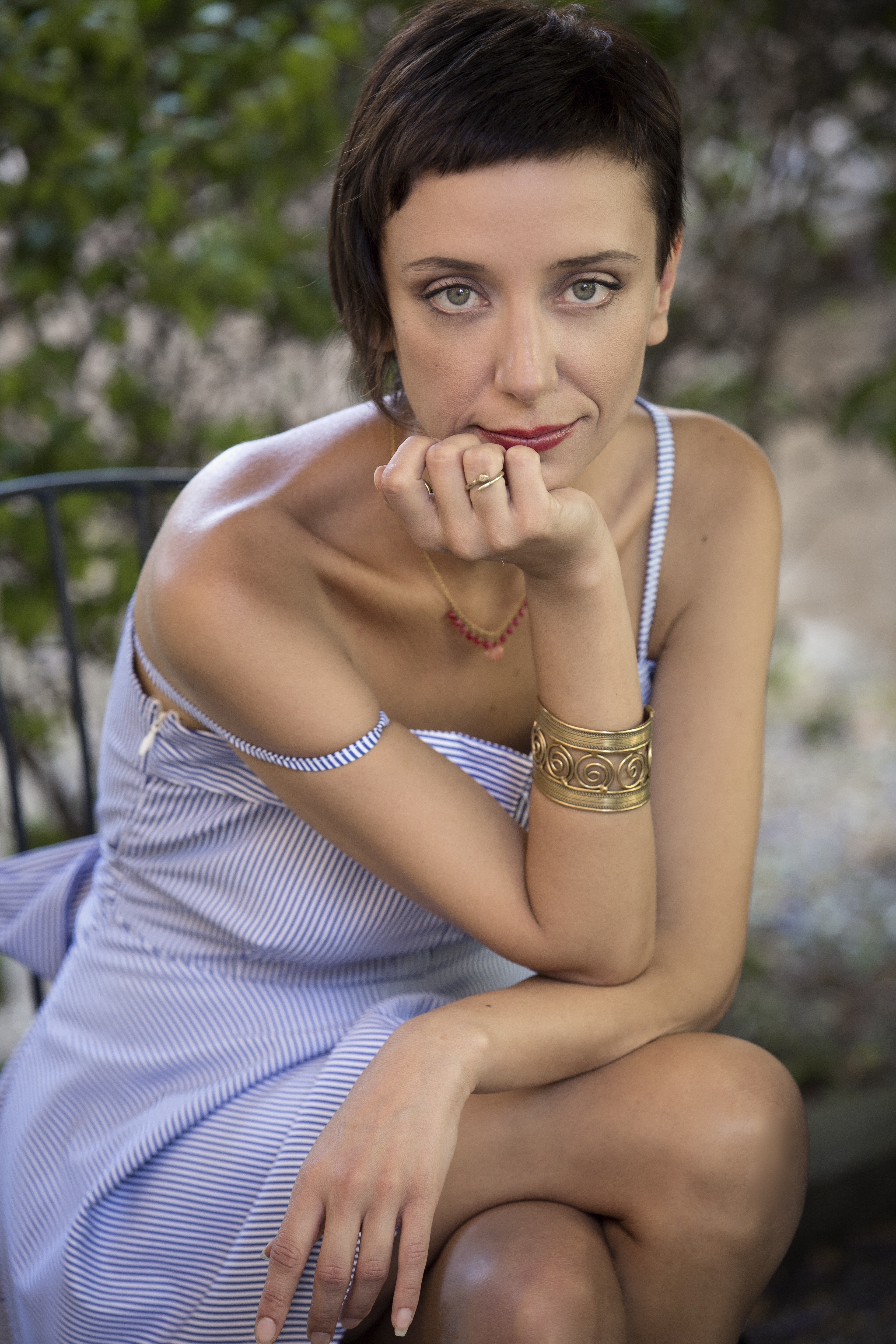 Francesca Bertuzzi fotografata da Pasquale Di Blasio